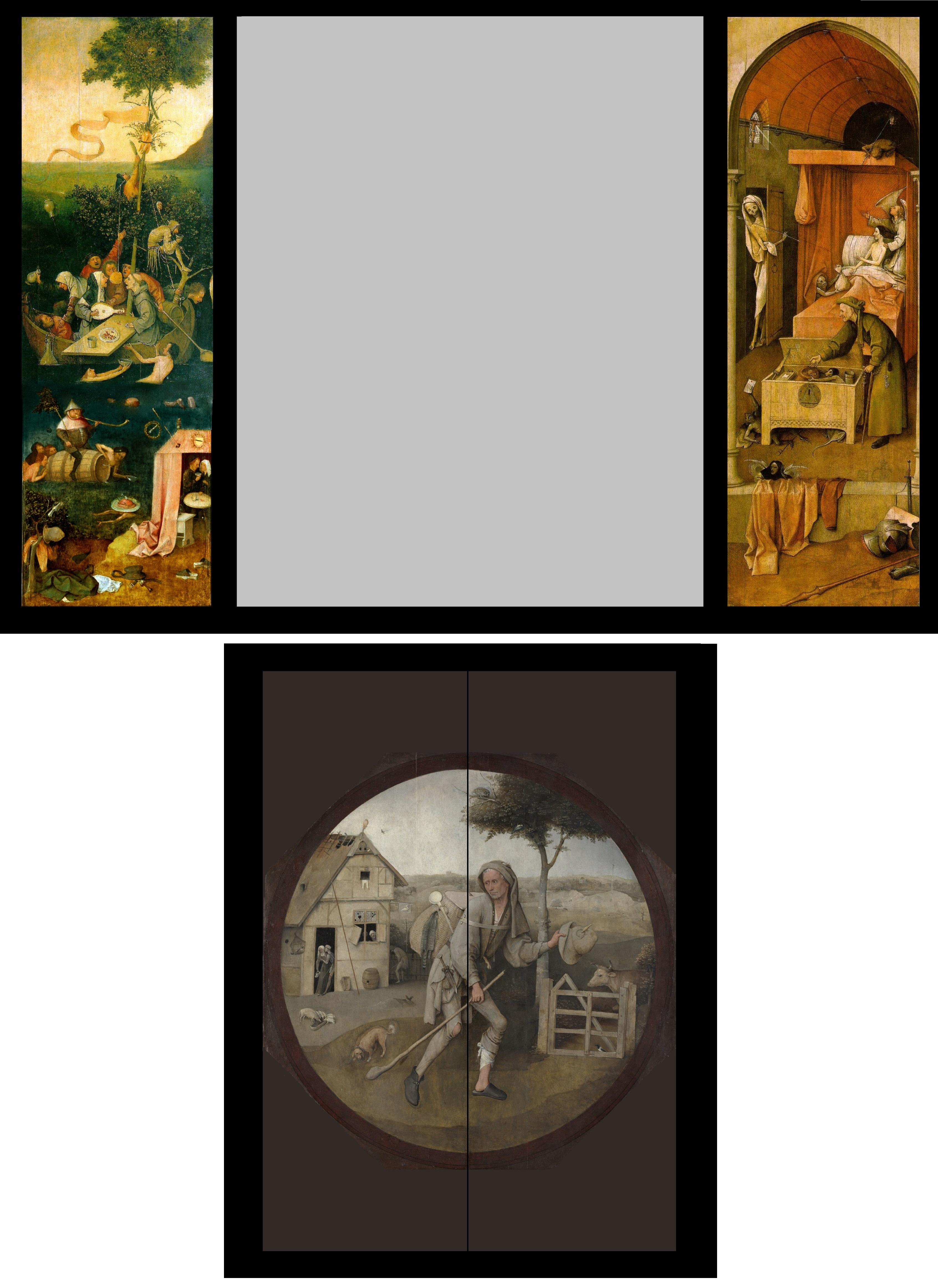 Reconstitution du Triptyque du vagabond.